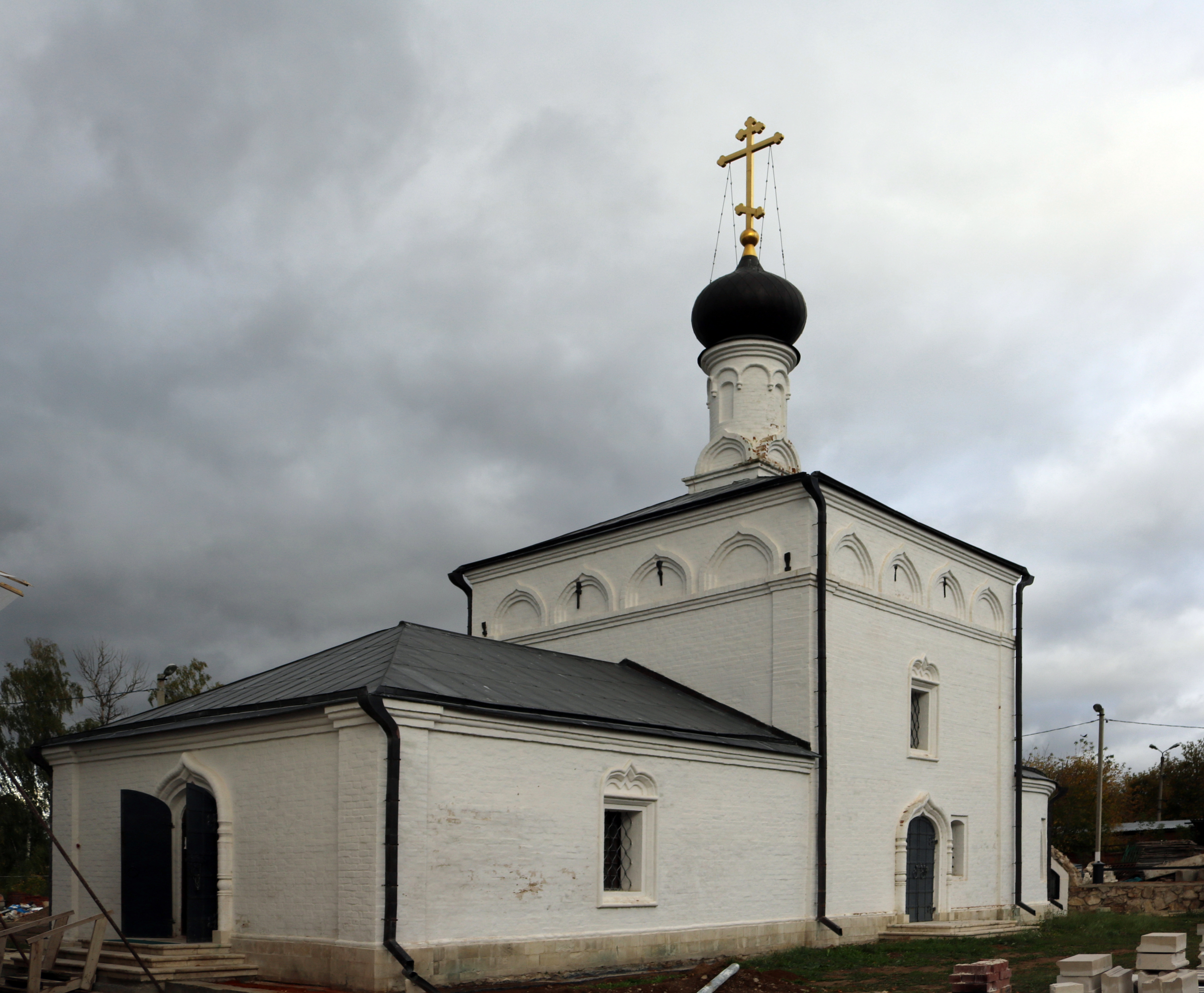 Собор Успенский (старый): площадь Базарная, Алексин, Алексинский район, Тульская область